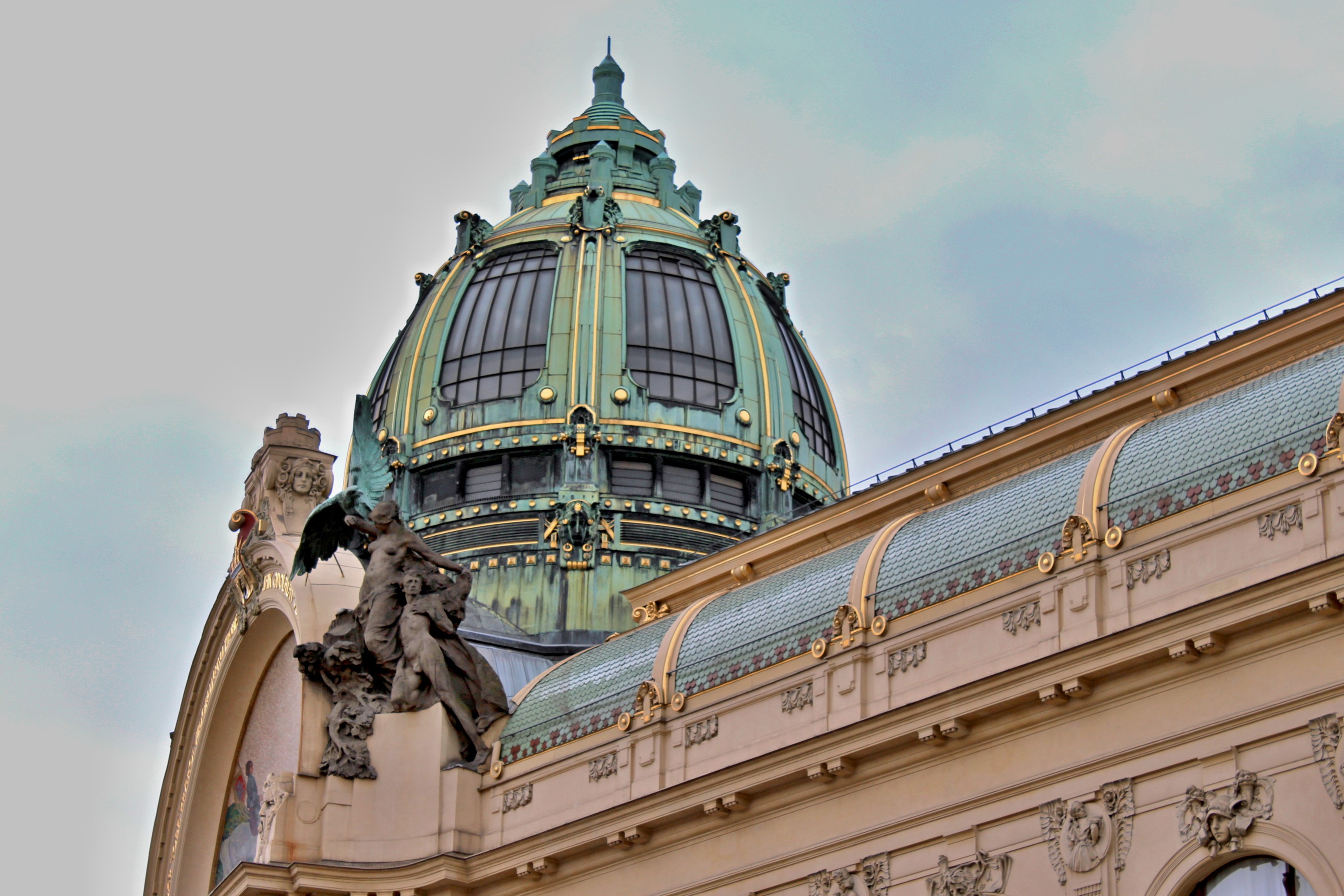 Obecní dům, Praha